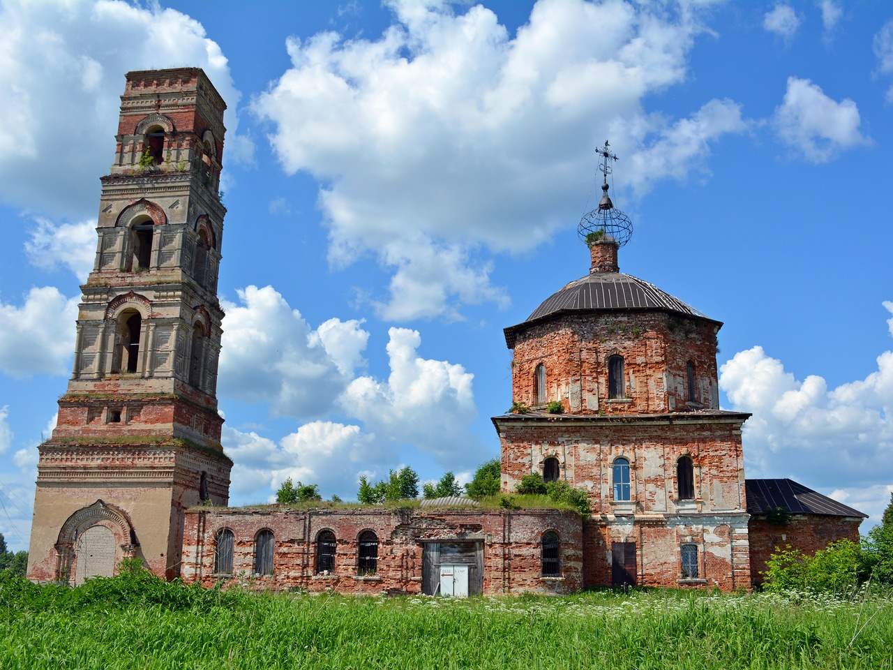 Успенская церковь (Тверская область, село Пушкино (Бели-Архиерейские))